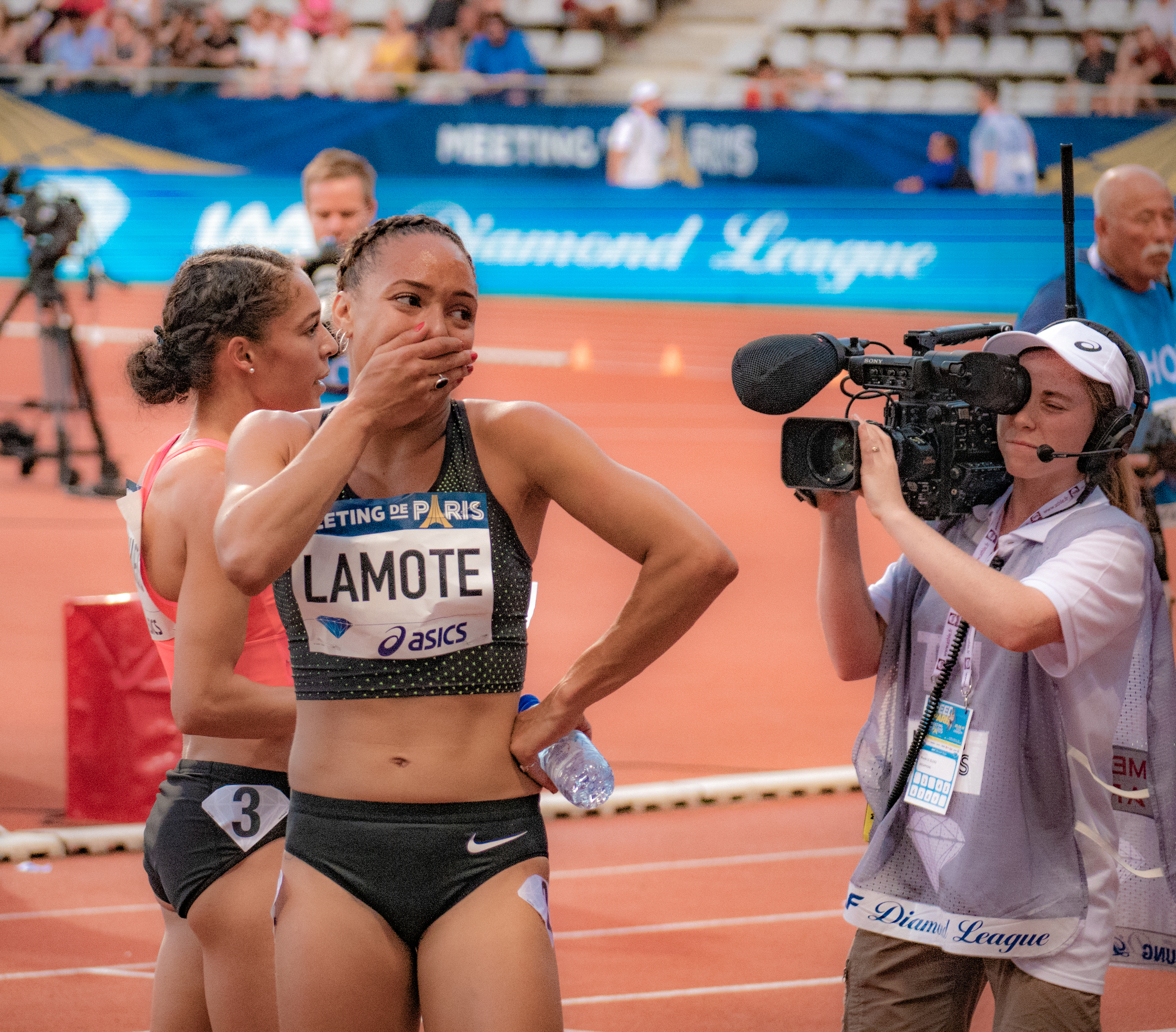 Rénelle Lamote, qualifiée pour la coupe d'Europe d'Athlétisme